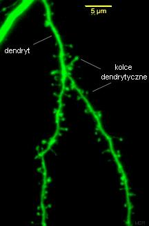 Dendryty pokryte kolcami dendrytycznymi.